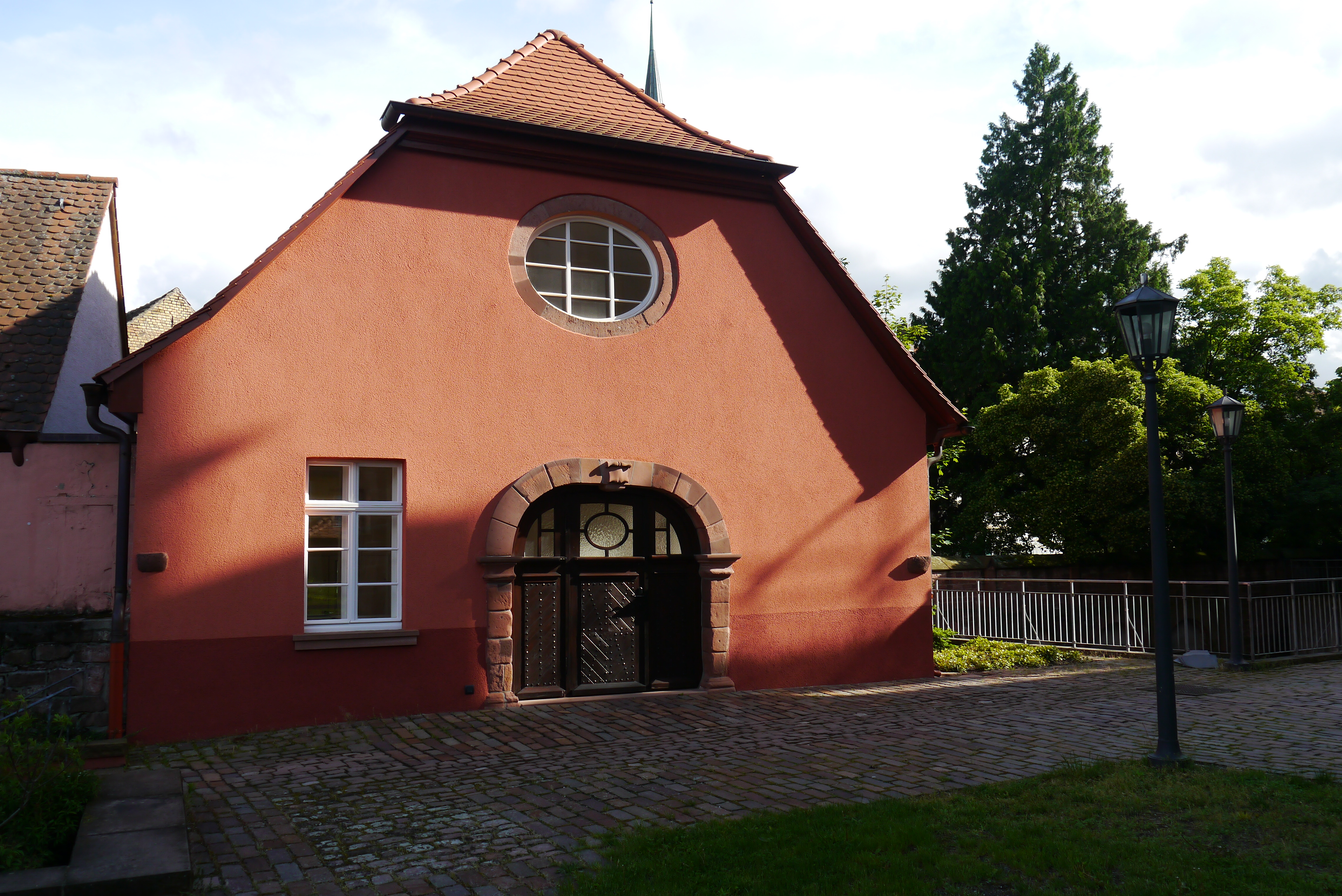 St. Michael, ehemaliges Beinhaus von St. Gallus (Ladenburg)